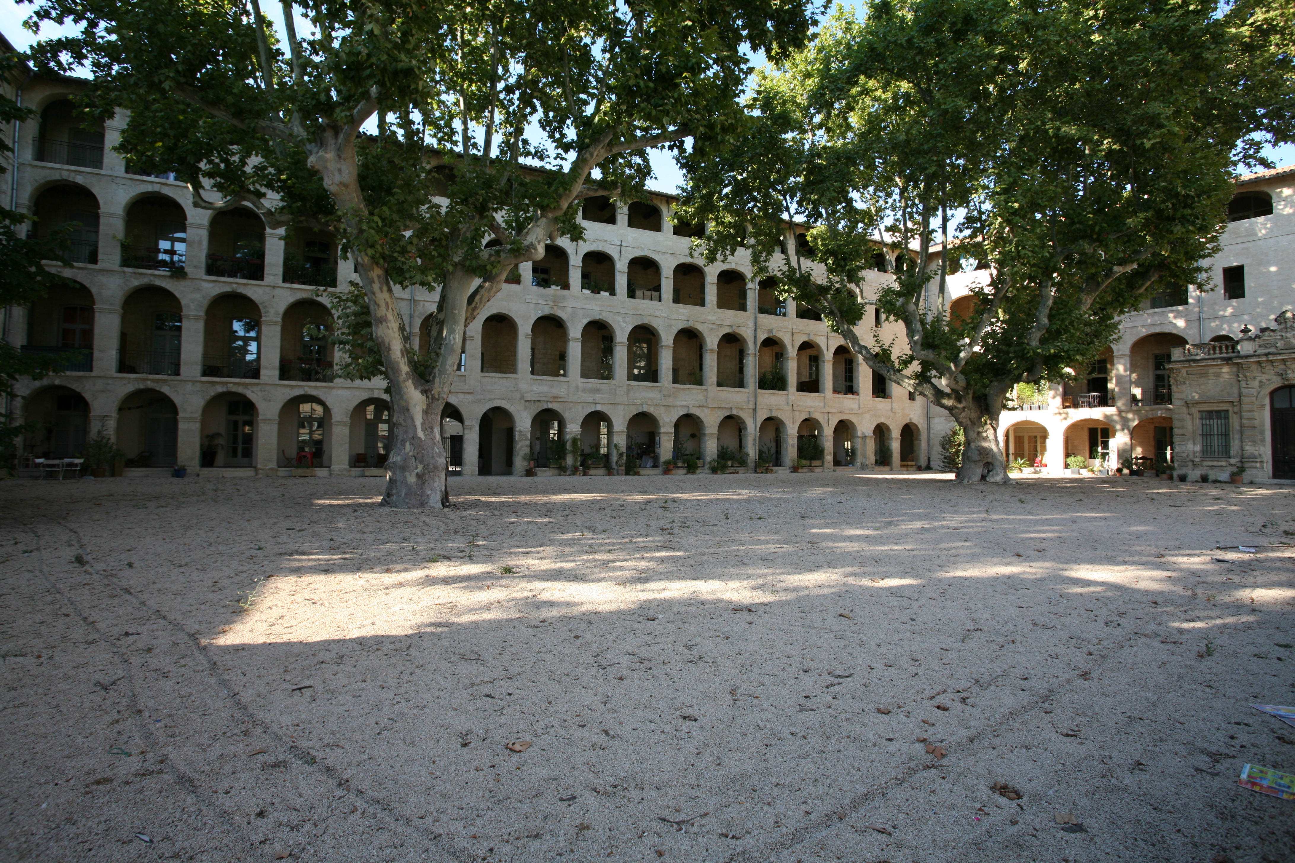 Clos des arts, Avignon, Vaucluse, France.